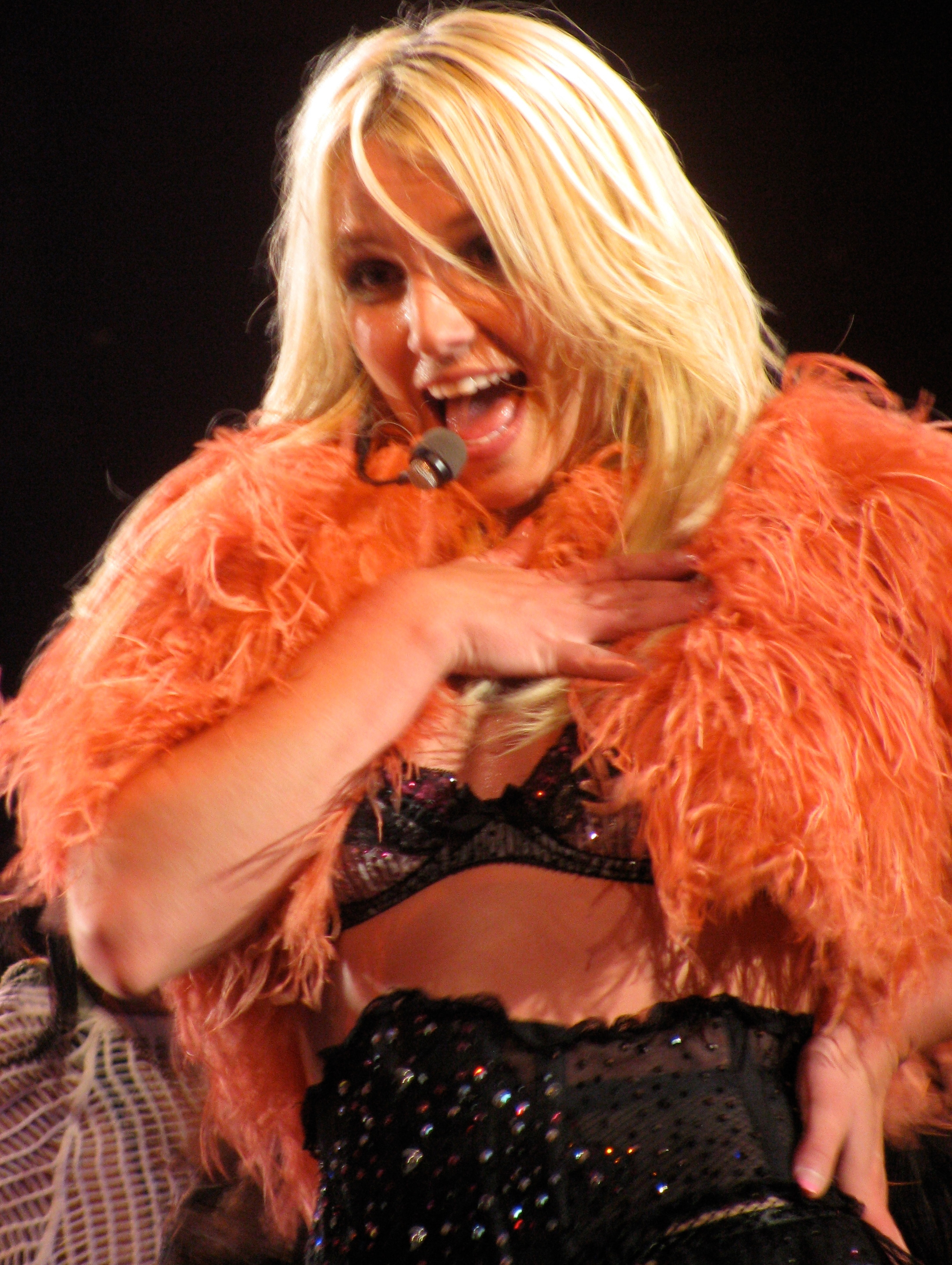 Cantando If You Seek Amy